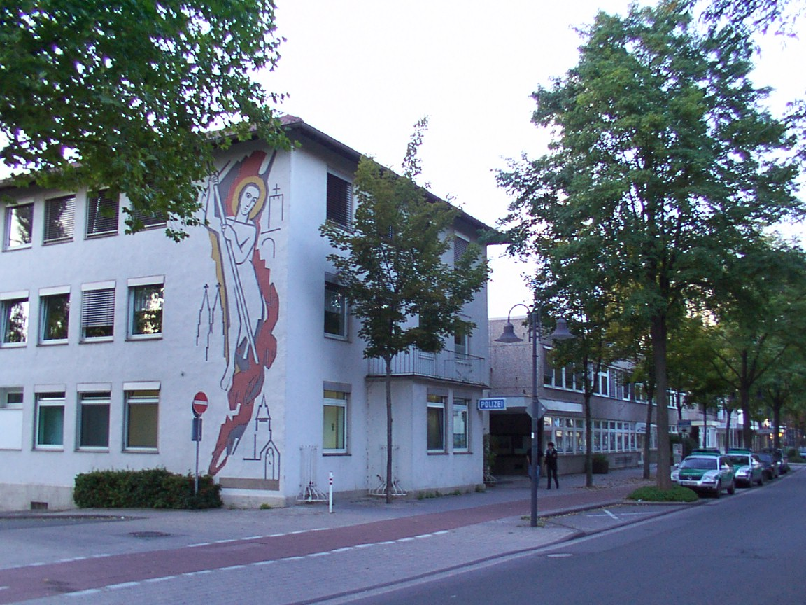 Paderborn: ehemalige Amtsverwaltung Schloß Neuhaus, Amtsweg/Ecke Bielefelder Straße; heute Verwaltungsnebenstelle der Stadtverwaltung Paderborn